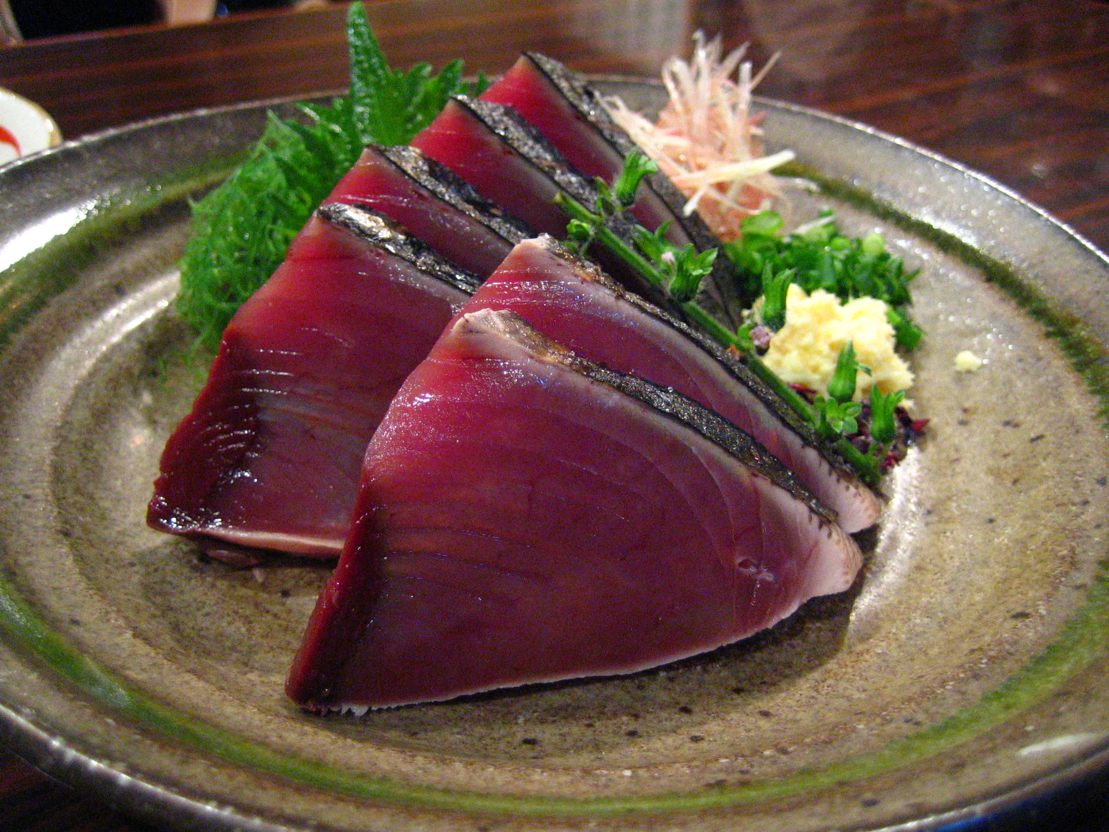 Katsuo Tataki (Japanese:かつおのたたき) Roasted Bonito (skipjack tuna).